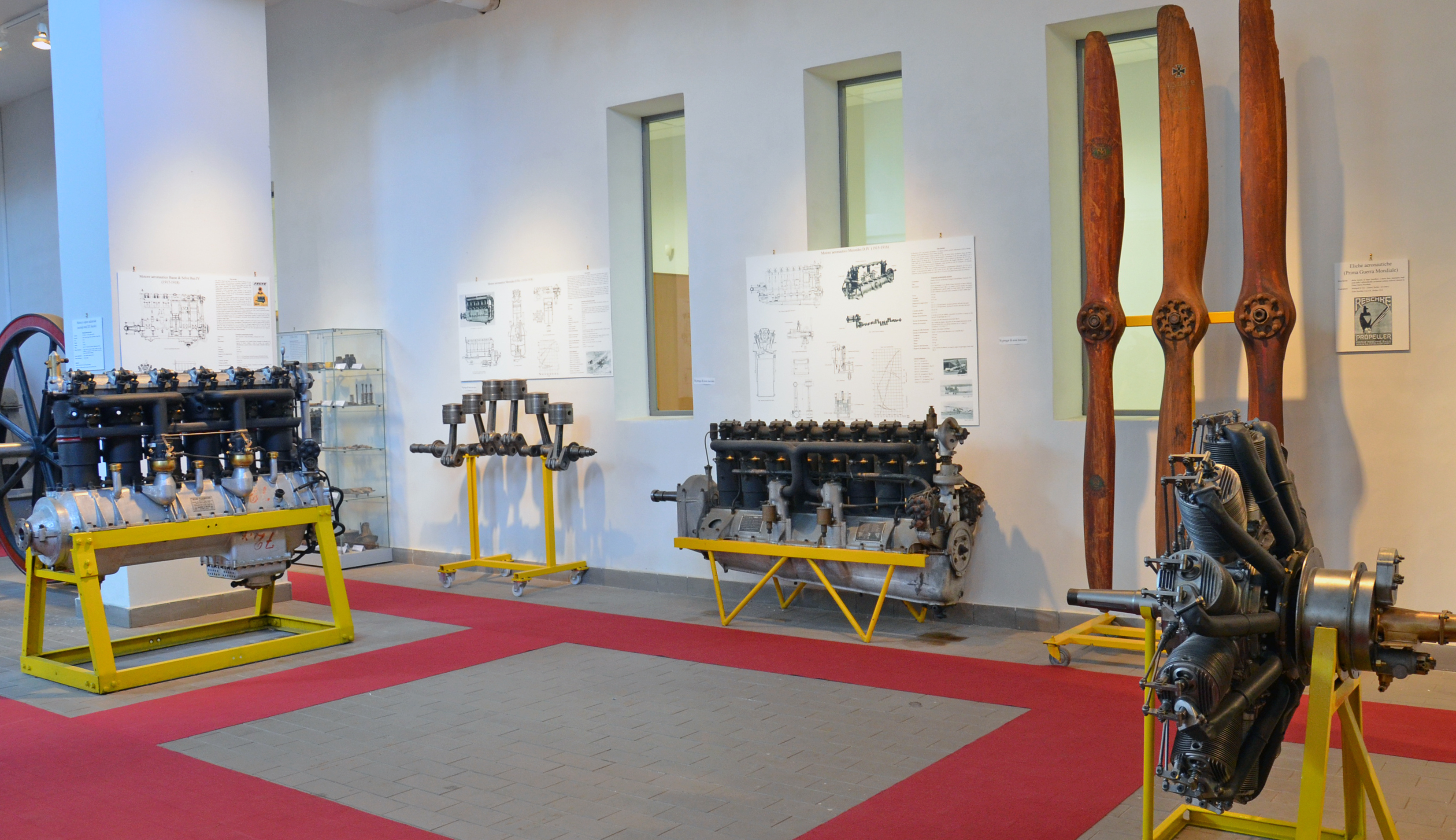 I motori aeronautici della Grande Guerra esposti al Museo dei Motori